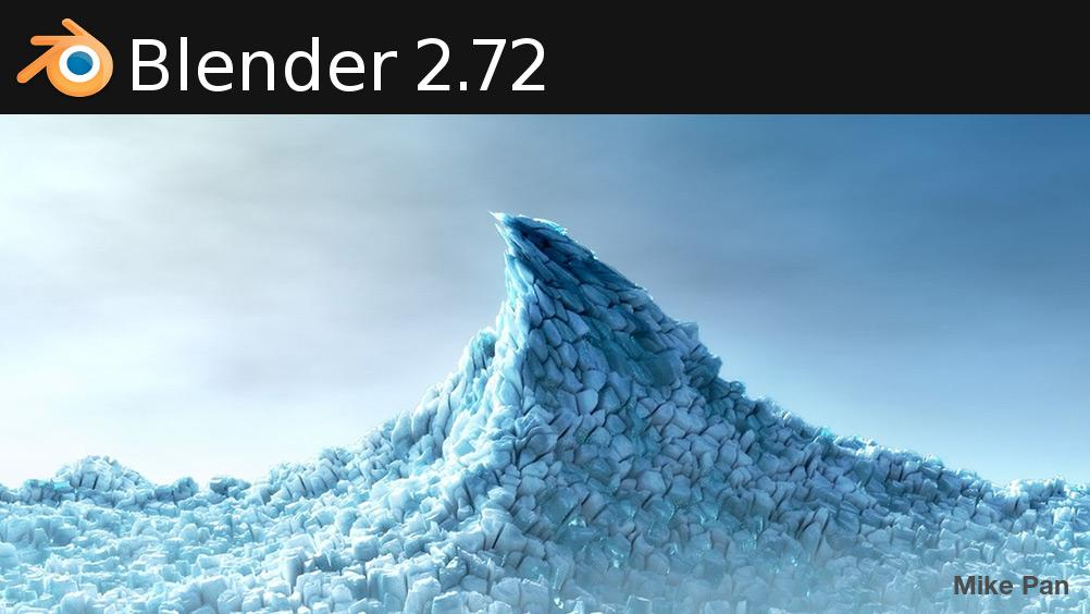 Blender 2.72 Splash Blender Foundation - Blender